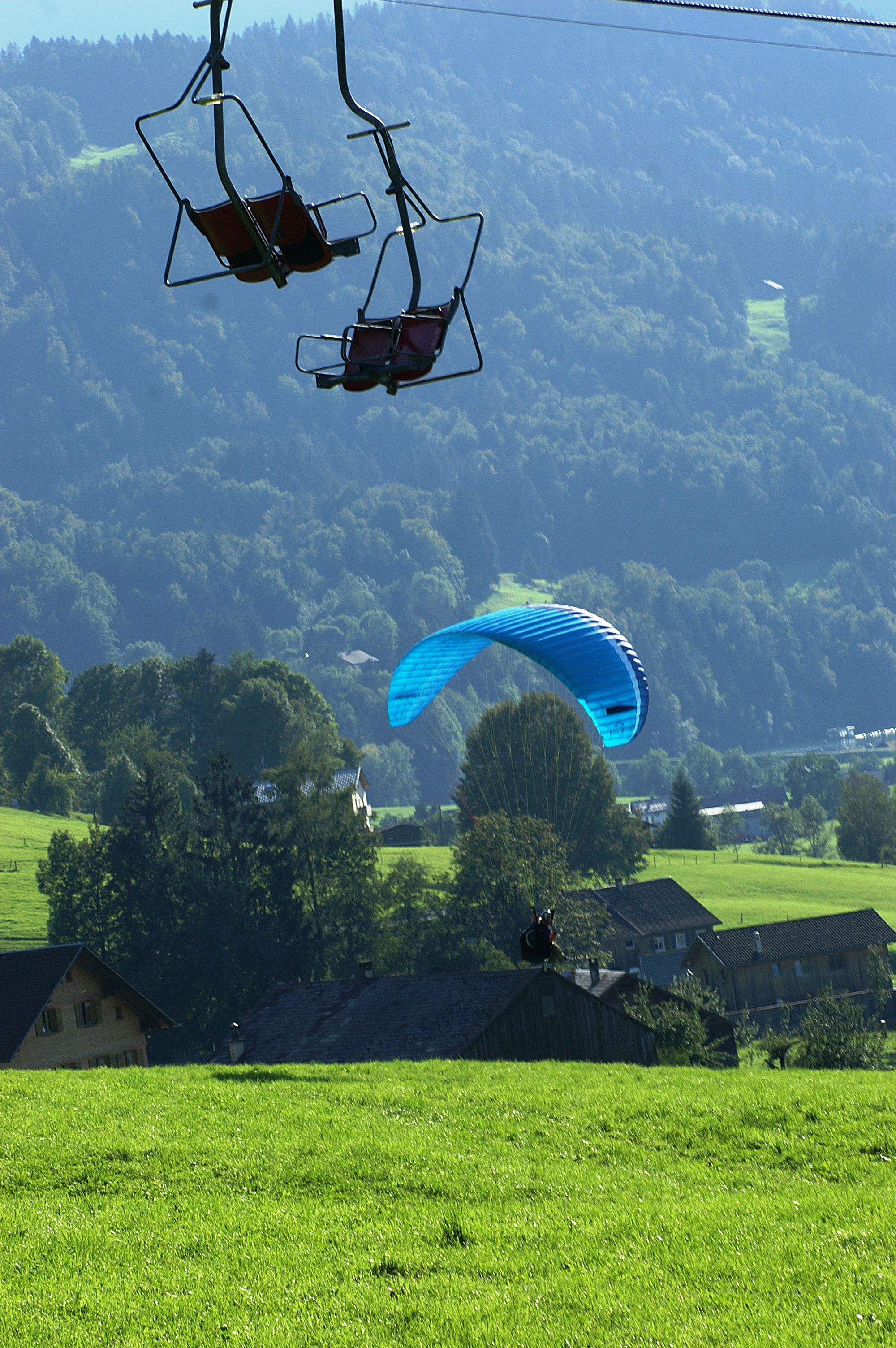 Paragliding auf der Niedere mit den Bergbahnen Andelsbuch in Vorarlberg